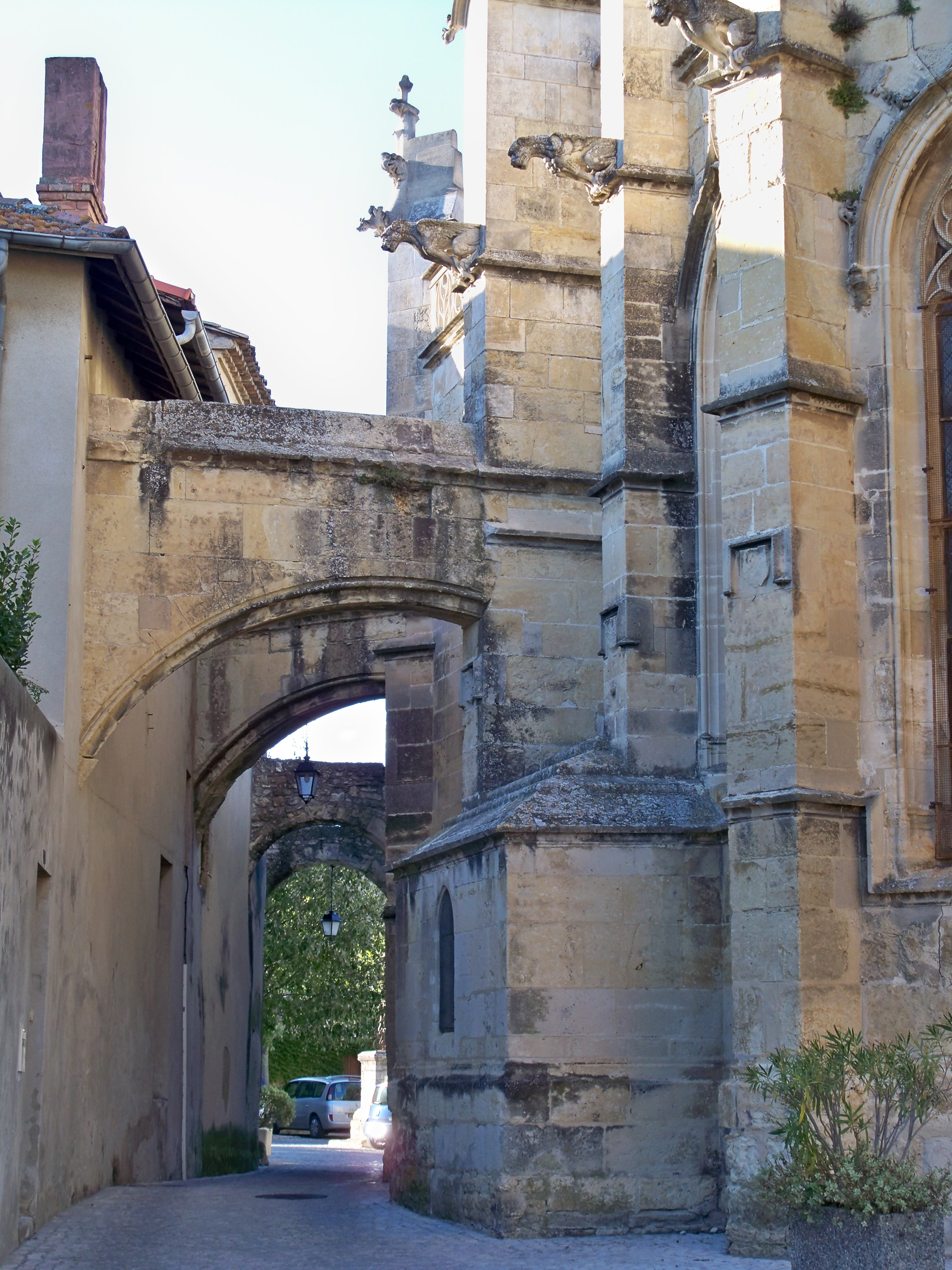 Rue des Courtines, le long de l'église de Caderousse, Vaucluse, France